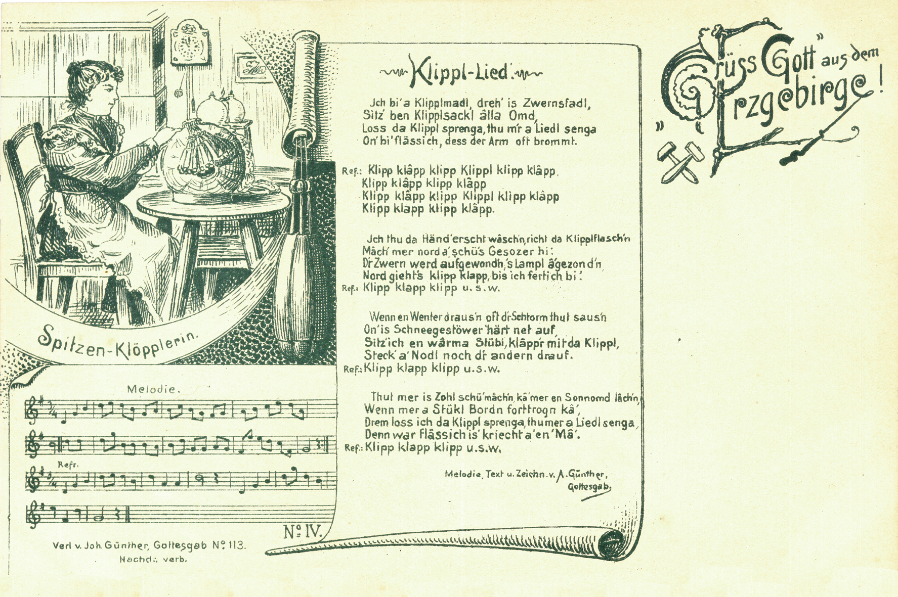 Erste Vorkarten-Version mit Noten, 1899